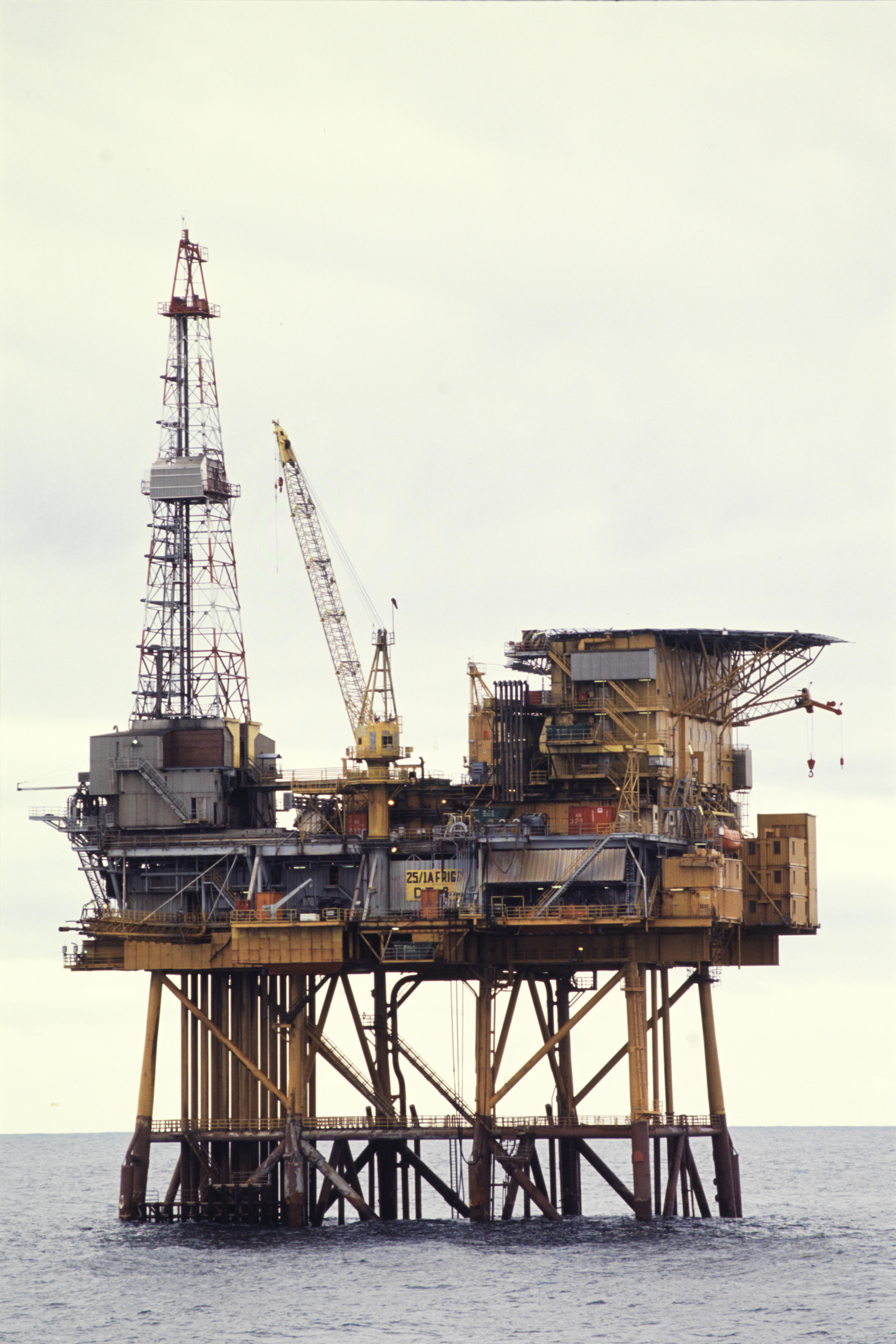 Bore- og produksjonsplattformen DP2 på Friggfeltet - operatør Elf. Blokk 25/1 A.